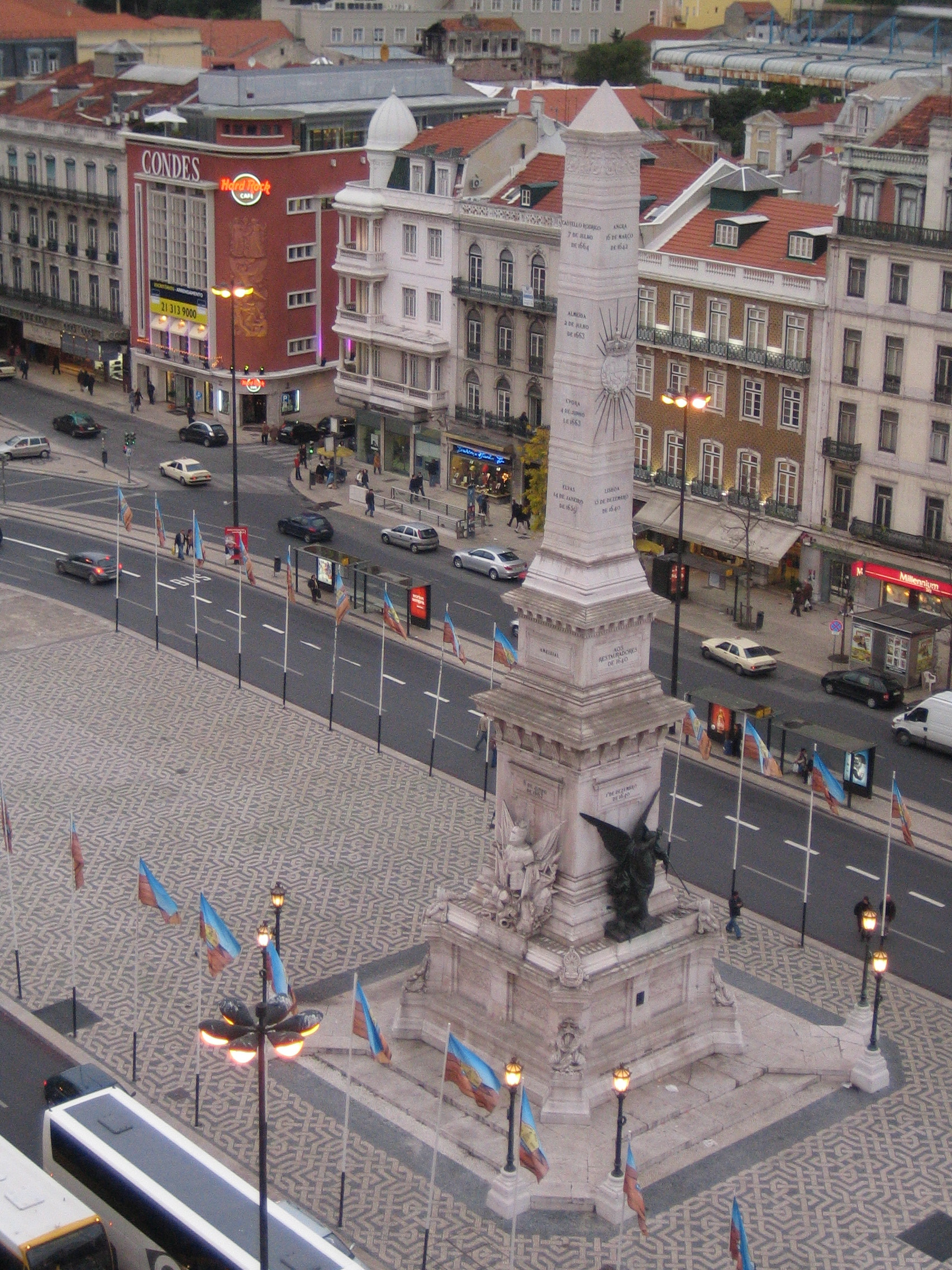 Restauradores Square in Lisbon, Portugal